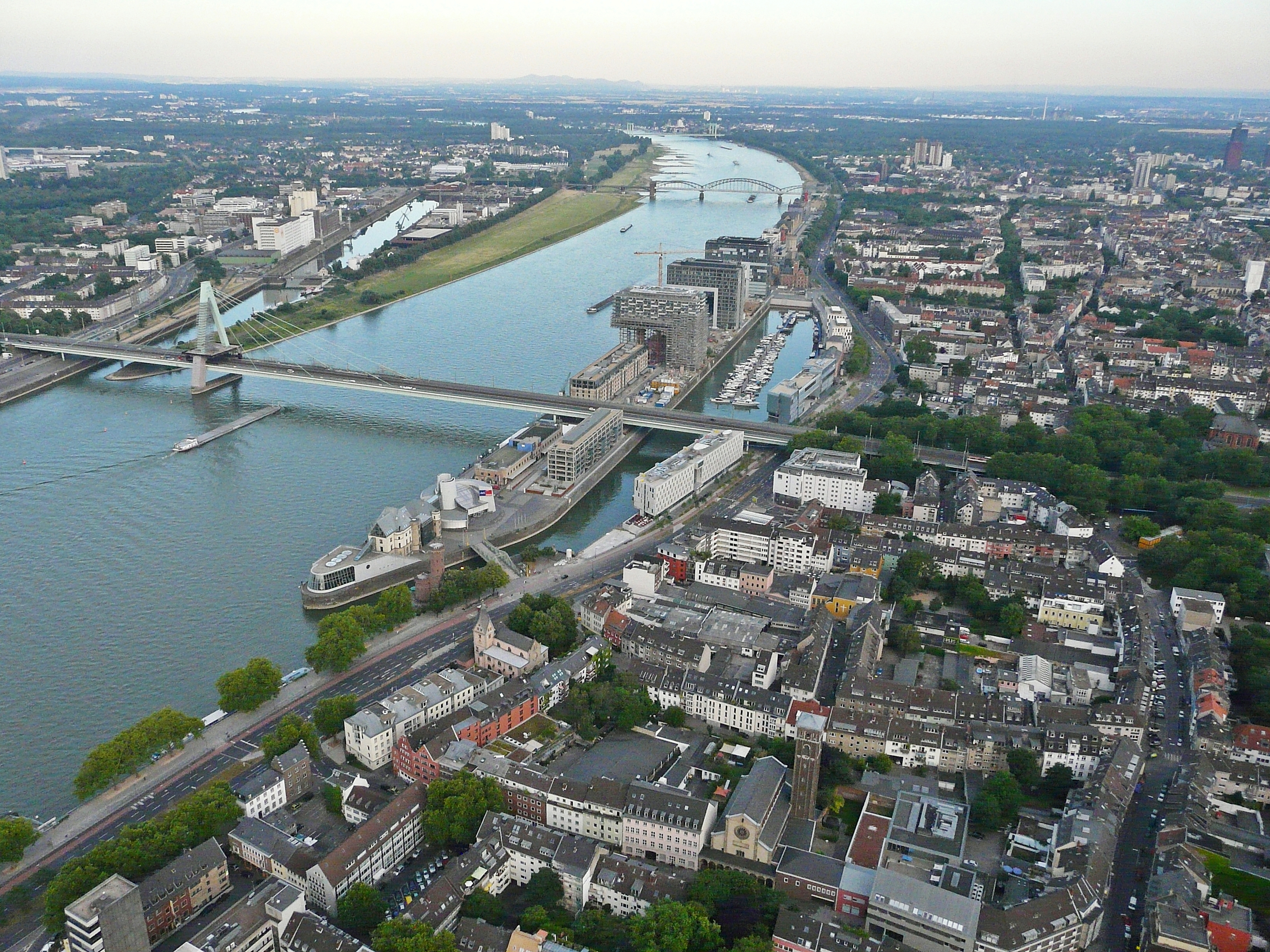 Kranhäuser, Rheinauhafen, Köln